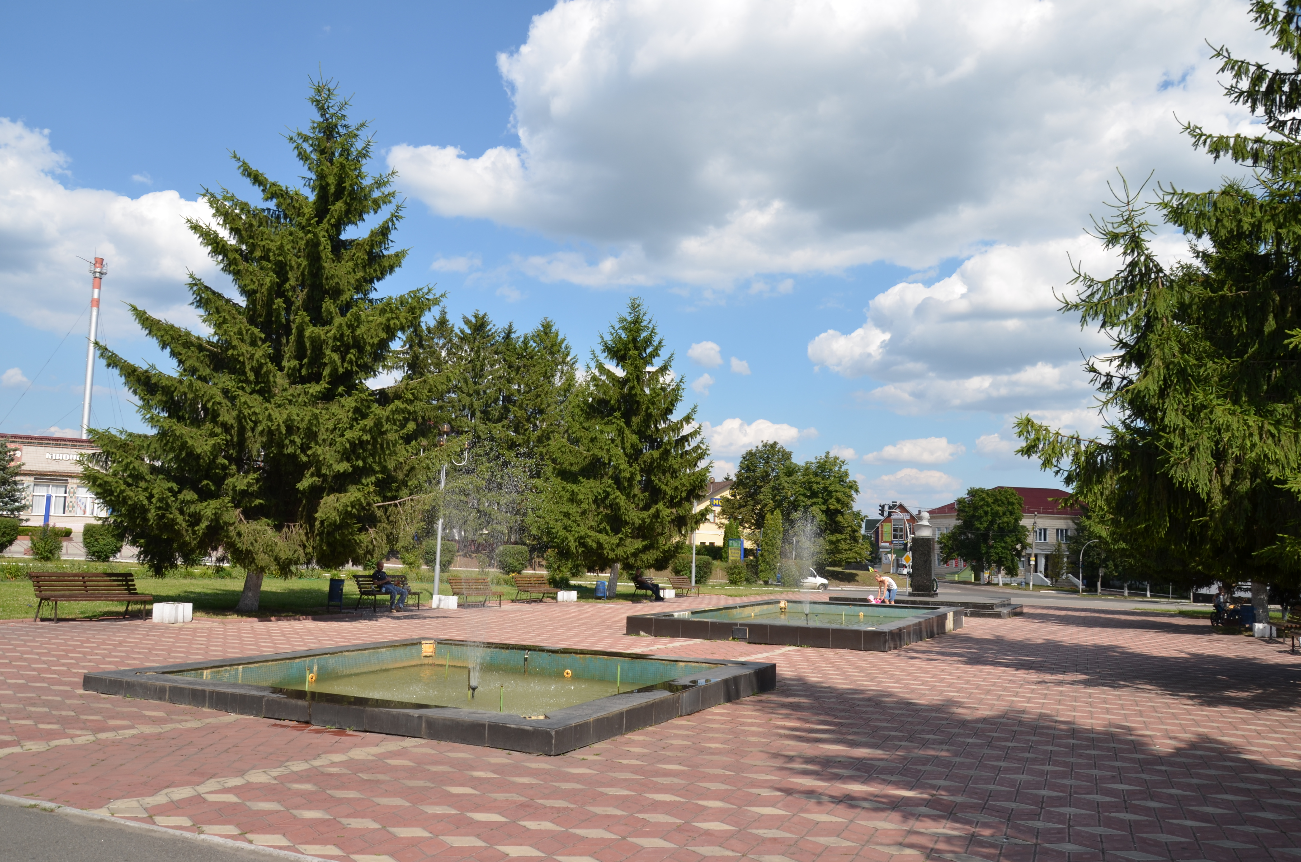 Пам’ятник Тарасу Григоровичу Шевченку, Макарів, площа РБК